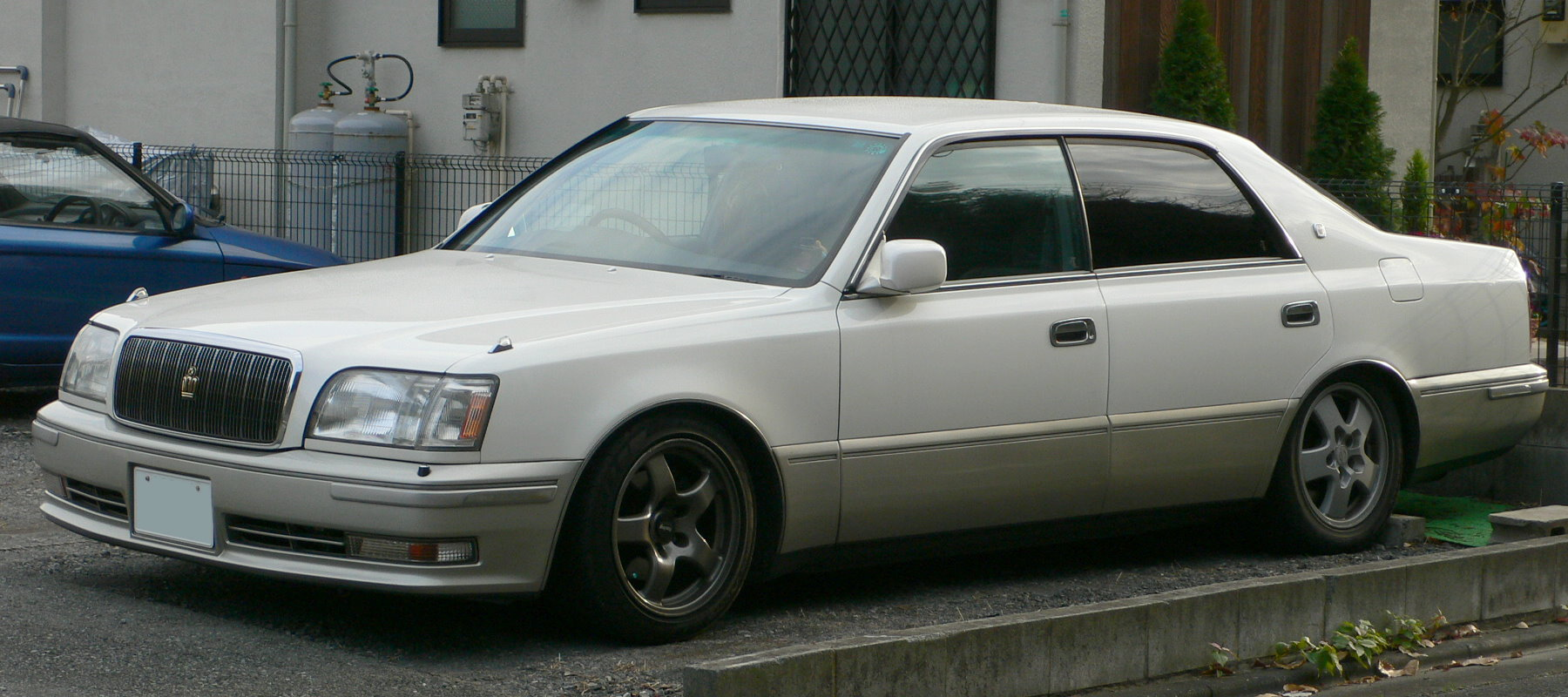 2nd generation Toyota Crown Majesta (トヨタ・クラウンマジェスタ) (1995/8 - 1997/7)